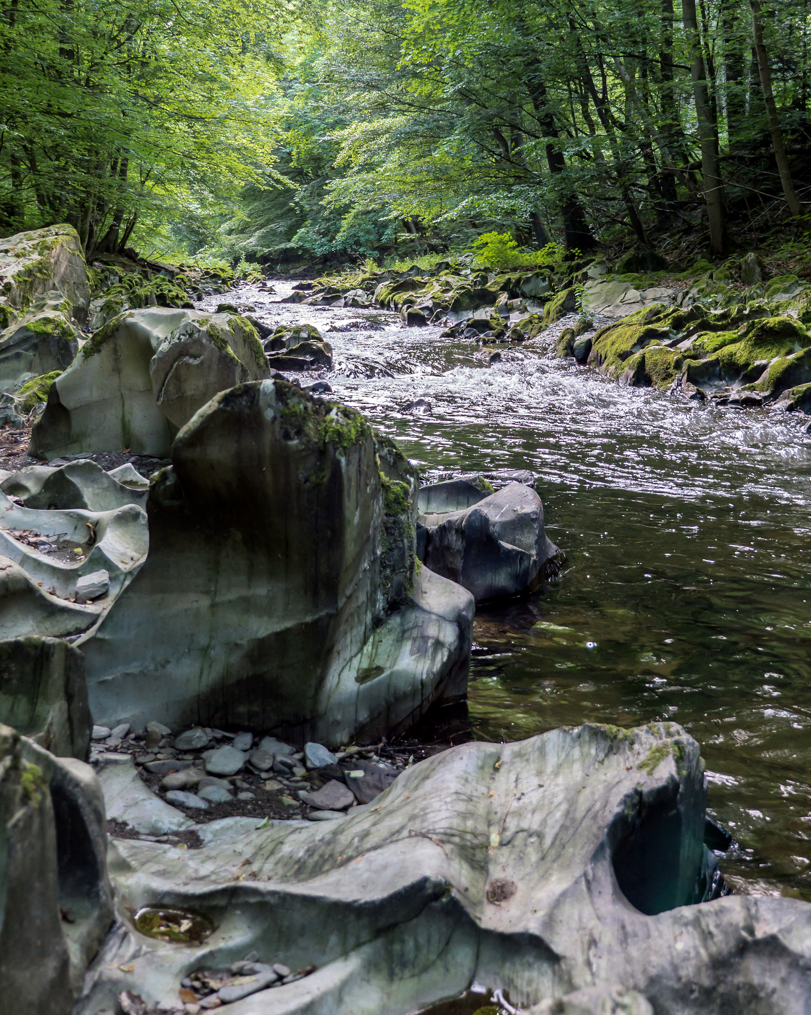 Die Schwarza zwischen Sitzendorf und Bad Blankenburg (NSG 159), Gegenlicht-Szene im Schwarzatal